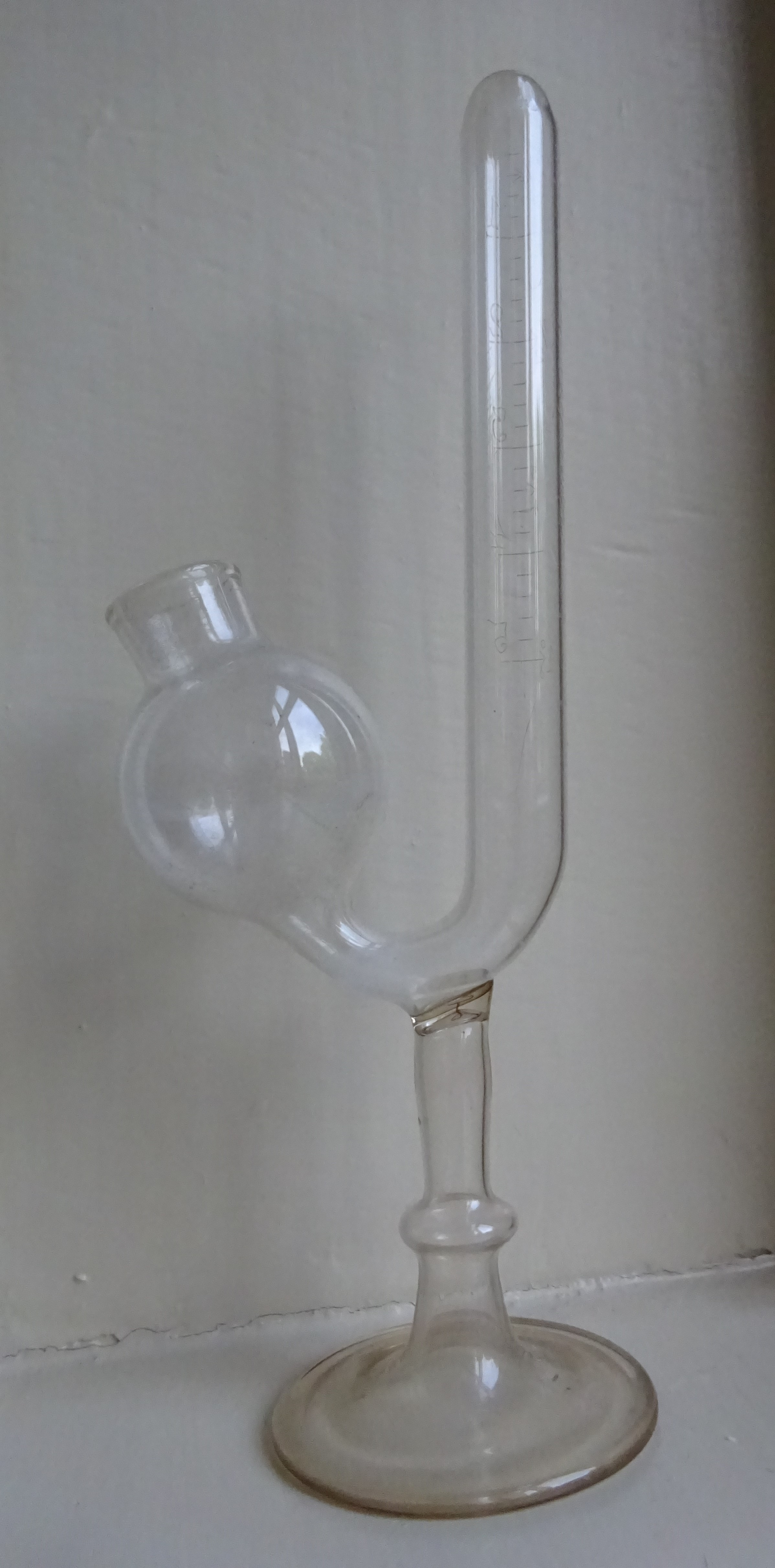 Het buisje is gebruikt door apotheker Groen in Aalsmeer en na zijn overlijden ter beschikking gesteld aan Stichting Farmaceutisch Erfgoed voor de collectie in Urk